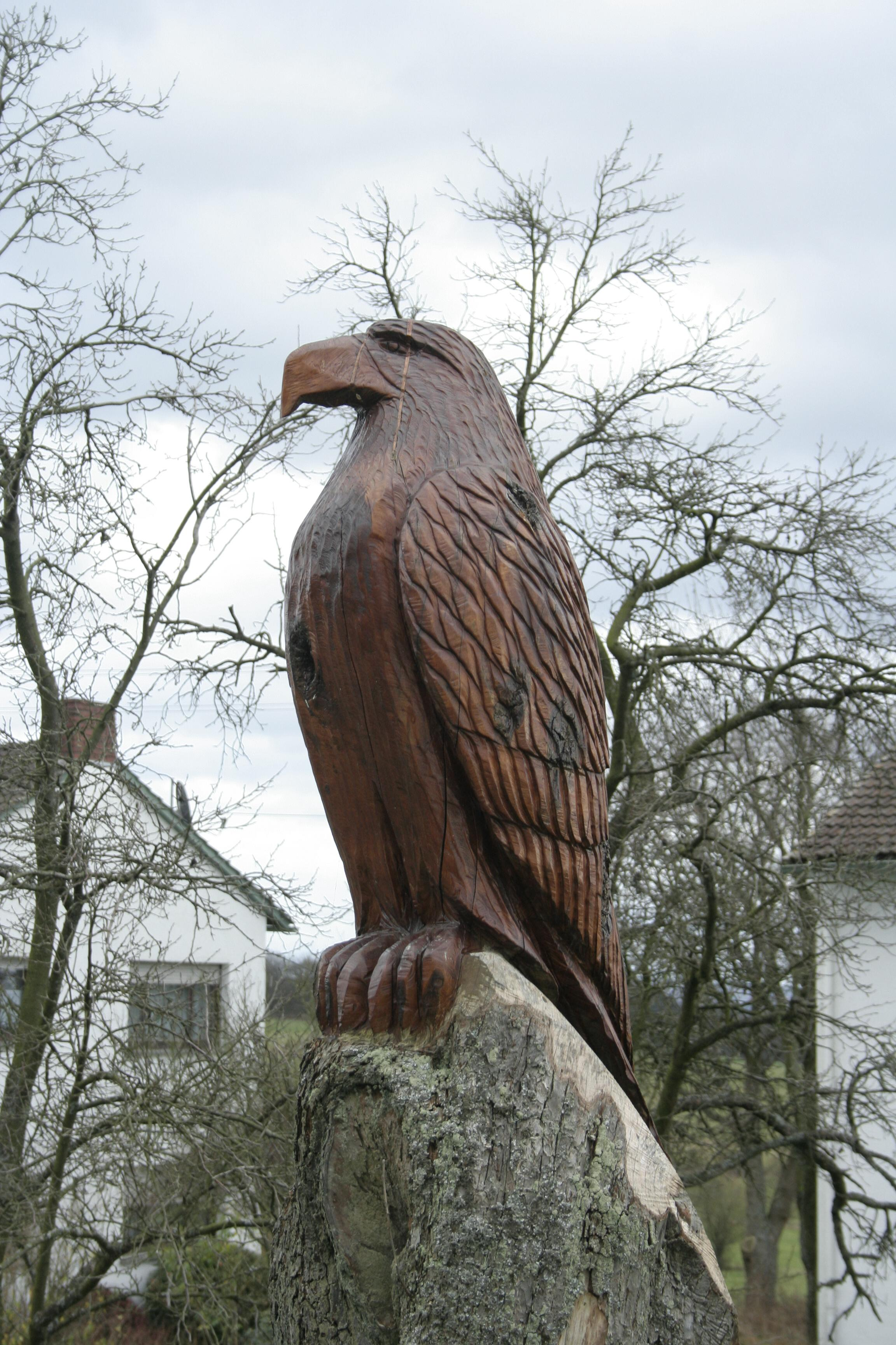 Skulptur eines hölzernen Adlers in Heupelzen im Westerwald